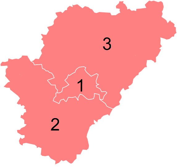 Résultats des élections législatives de Charente en 2012